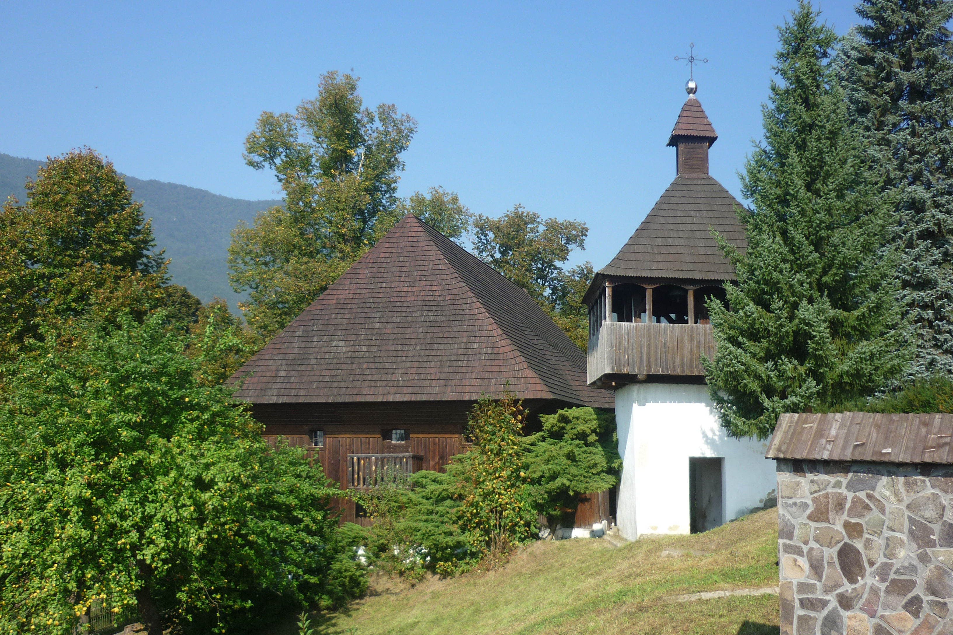 Evangelische Artikularkirche mit Glockenturm in Istebné bei Dolný Kubín (Unterkubin) in der Slowakei